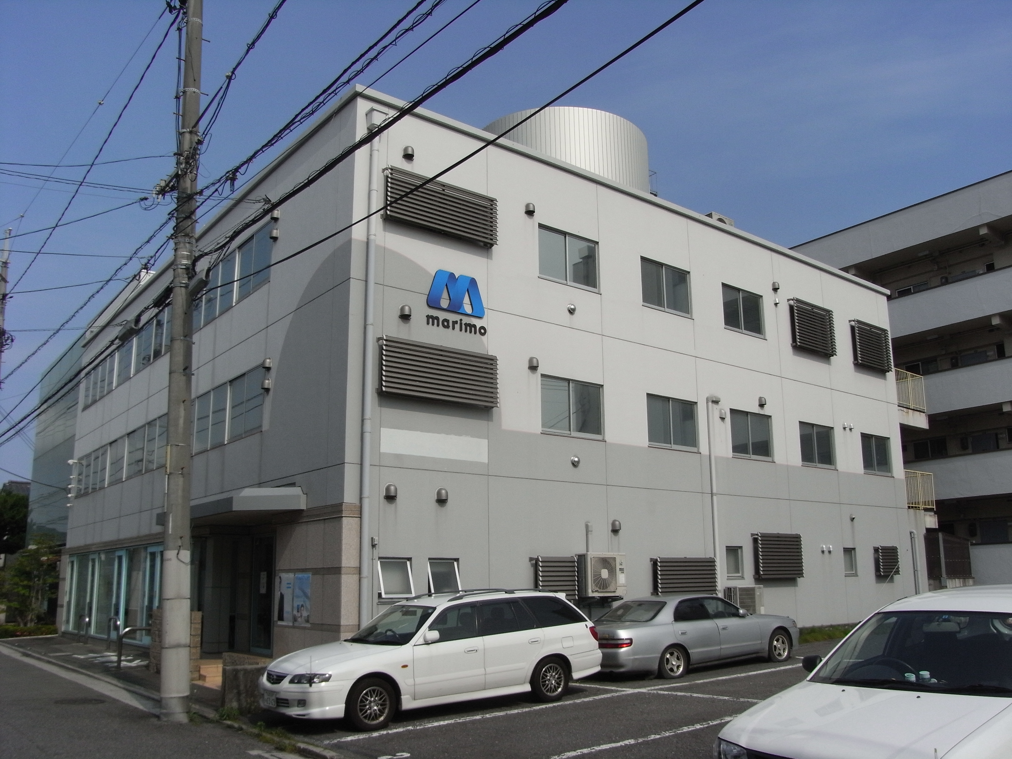 マリモ (不動産)